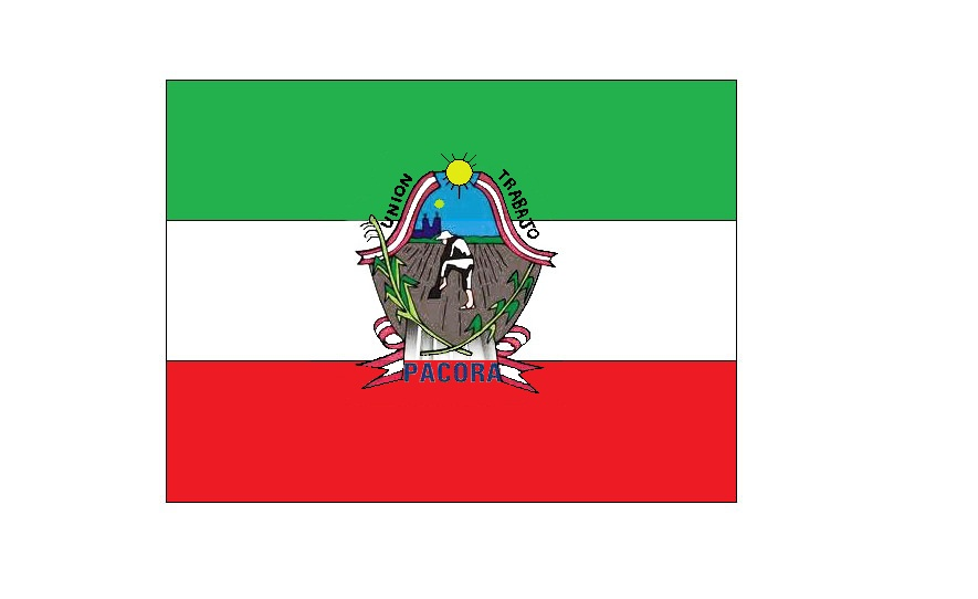 Bandera del distrito de Pacora, perteneciente a la provincia de Lambayeque y departamento del mismo nombre